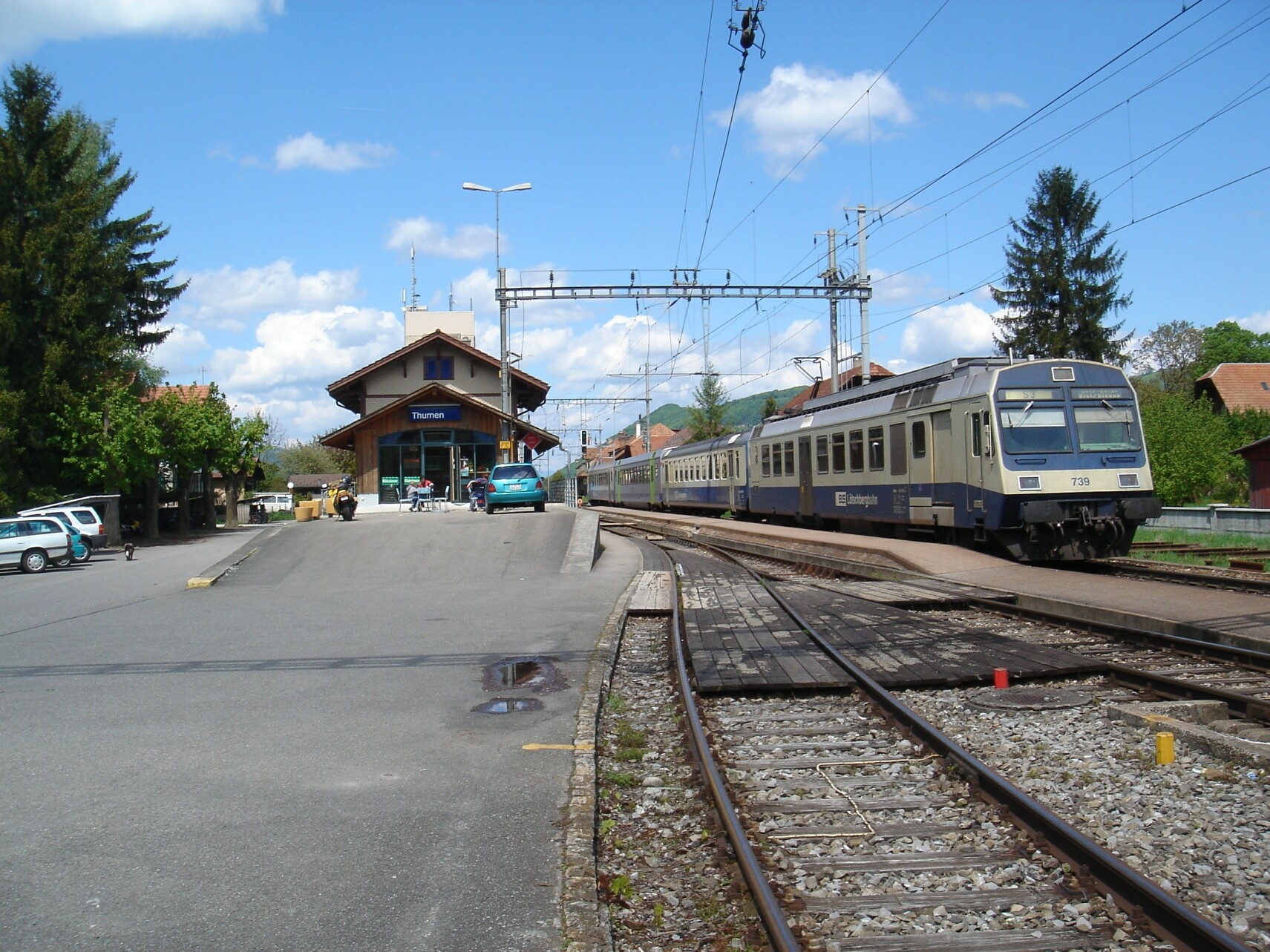 Bahnhof Thurnen (Gemeinde Mühlethurnen, Gürbetal) mit Zug der BLS. Im ehemaligen Güterschuppen ist jetzt ein Bistro eingerichtet.